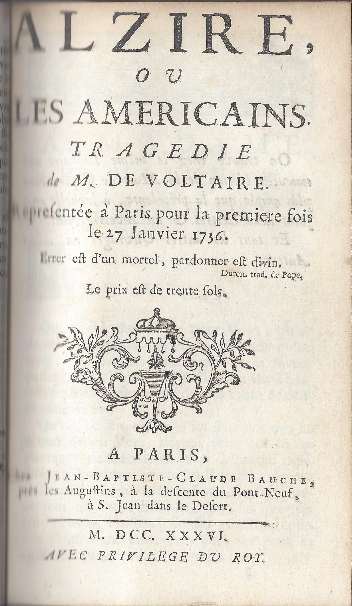 Titelblatt der Erstausgabe von Voltaires Tragödie Alzire bei Bauche, 1736